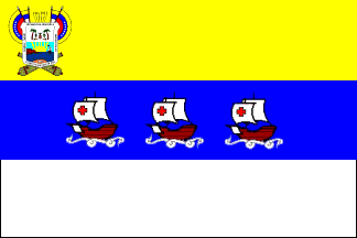 Bandera del municipio Valdez, estado Sucre, Venezuela